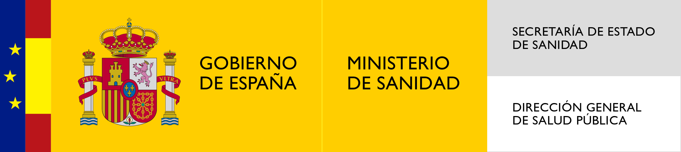 Logotipo de la Dirección General de Salud Pública, Calidad e Innovación